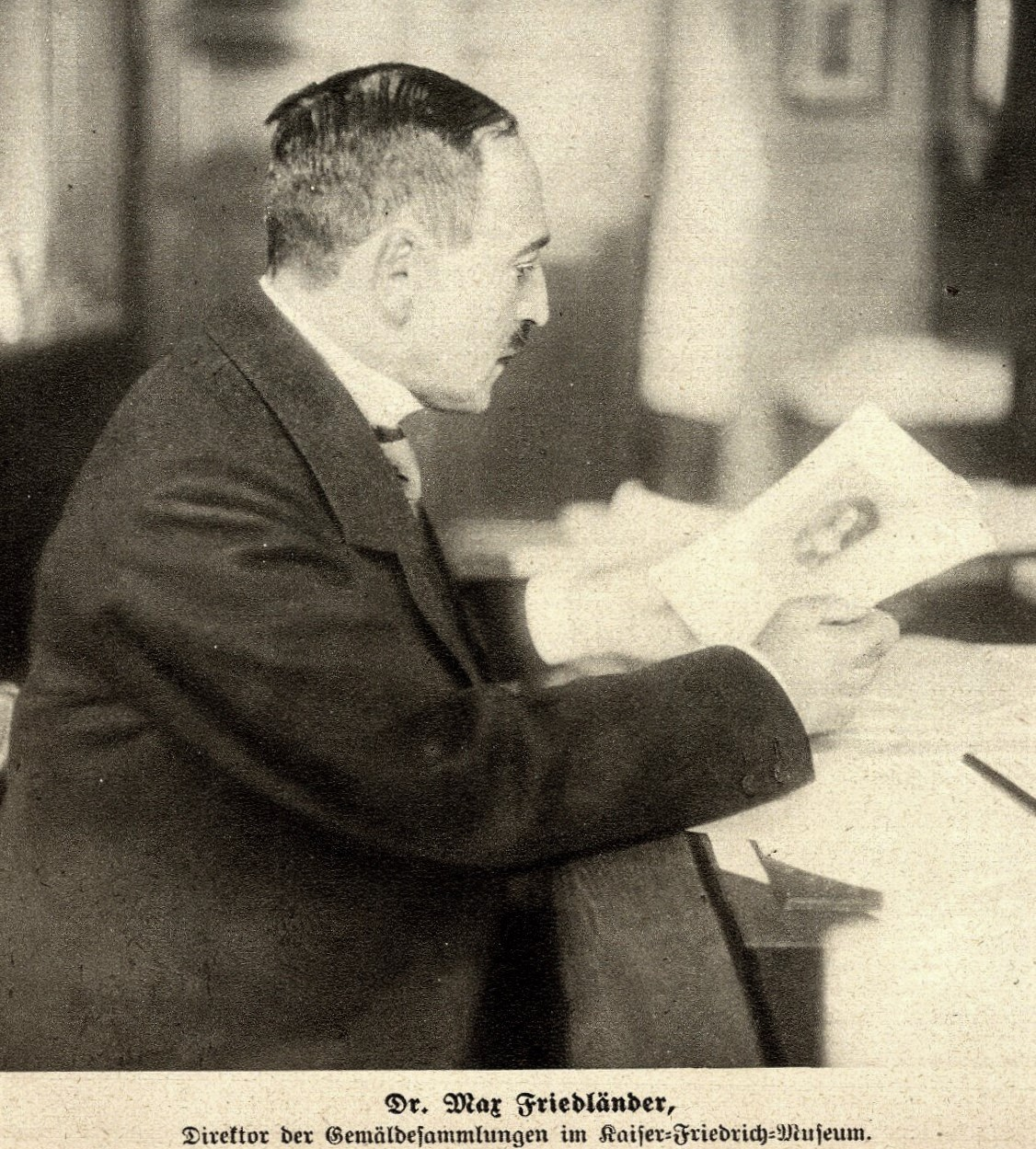 Dr. Max J. Friedländer, Direktor der Gemäldesammlungen im Kaiser-Friedrich-Museum, 1913